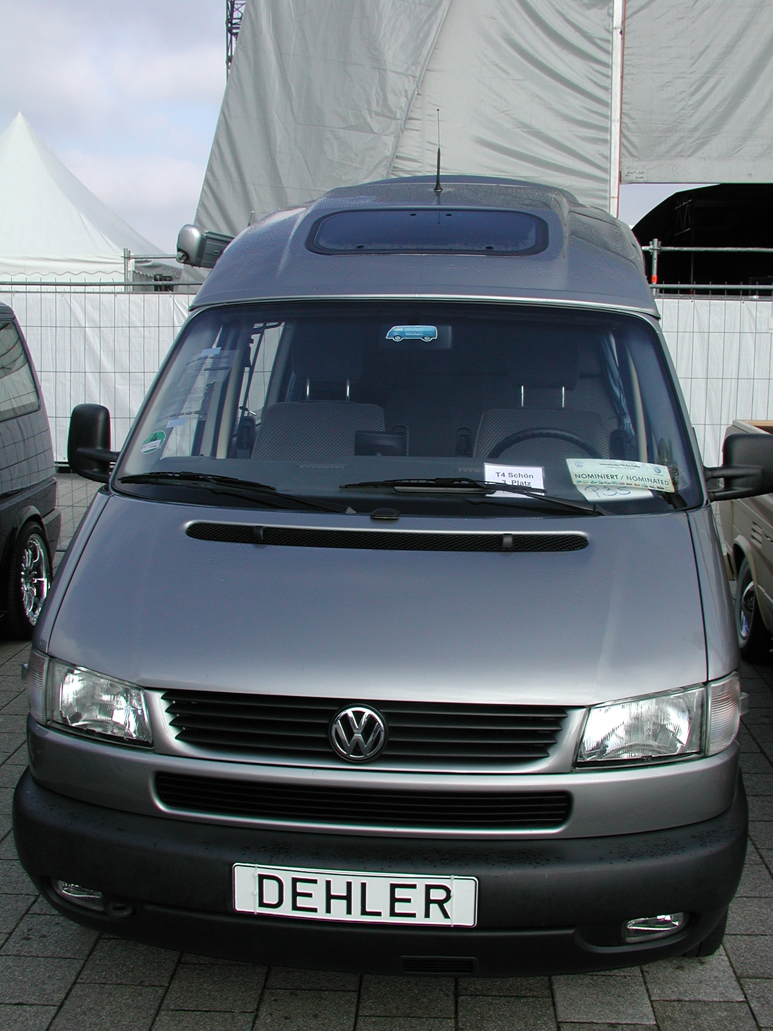 VW Dehler Typ2 T4 Optima 5.4 Baujahr 06/1998